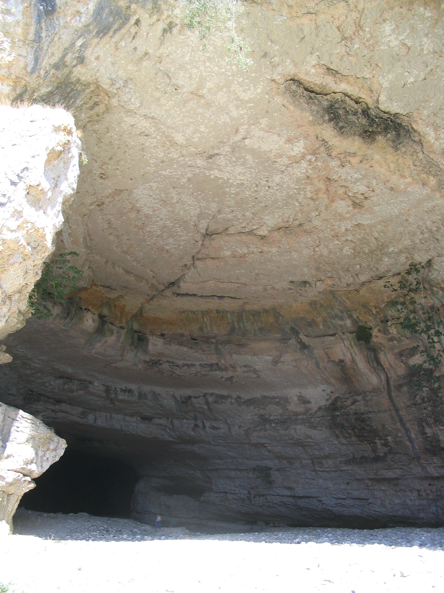 Une des grotte creusée par la Cesse à Minerve dans l'Hérault